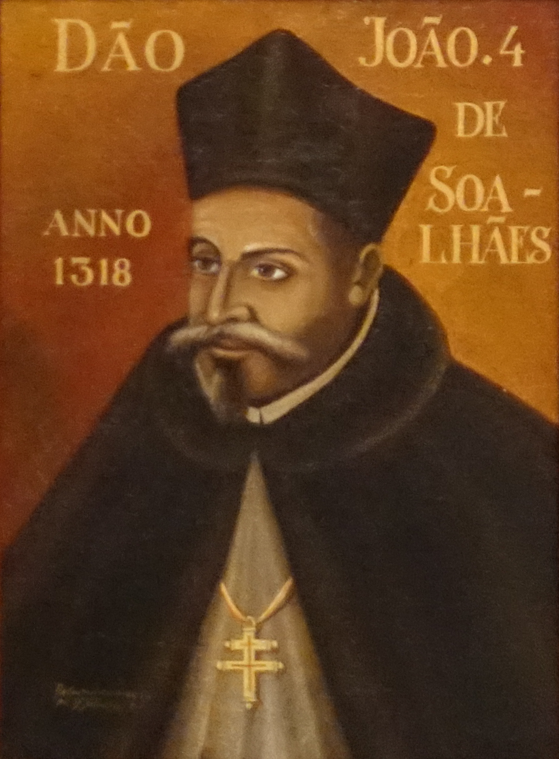 D. João de Soalhães, Galeria dos Arcebispos de Braga